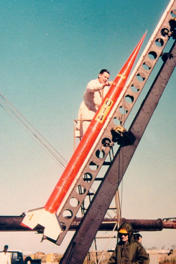 Un científico realiza últimos preparativos al cohete Orión II O-14.